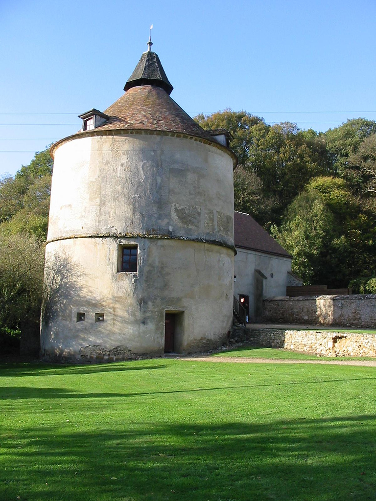 Pigeonnier de Port Royal des ChampsPigeonnier, Abbaye Port Royal des Champs